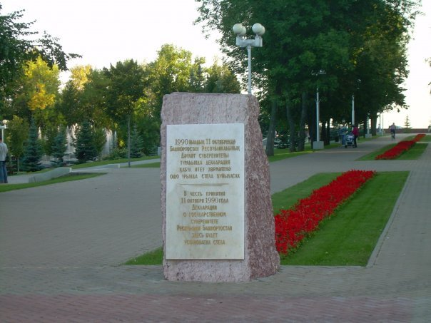 Мемориальная доска в городском парке Уфы